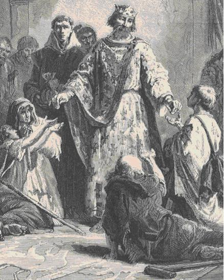 image de robert II